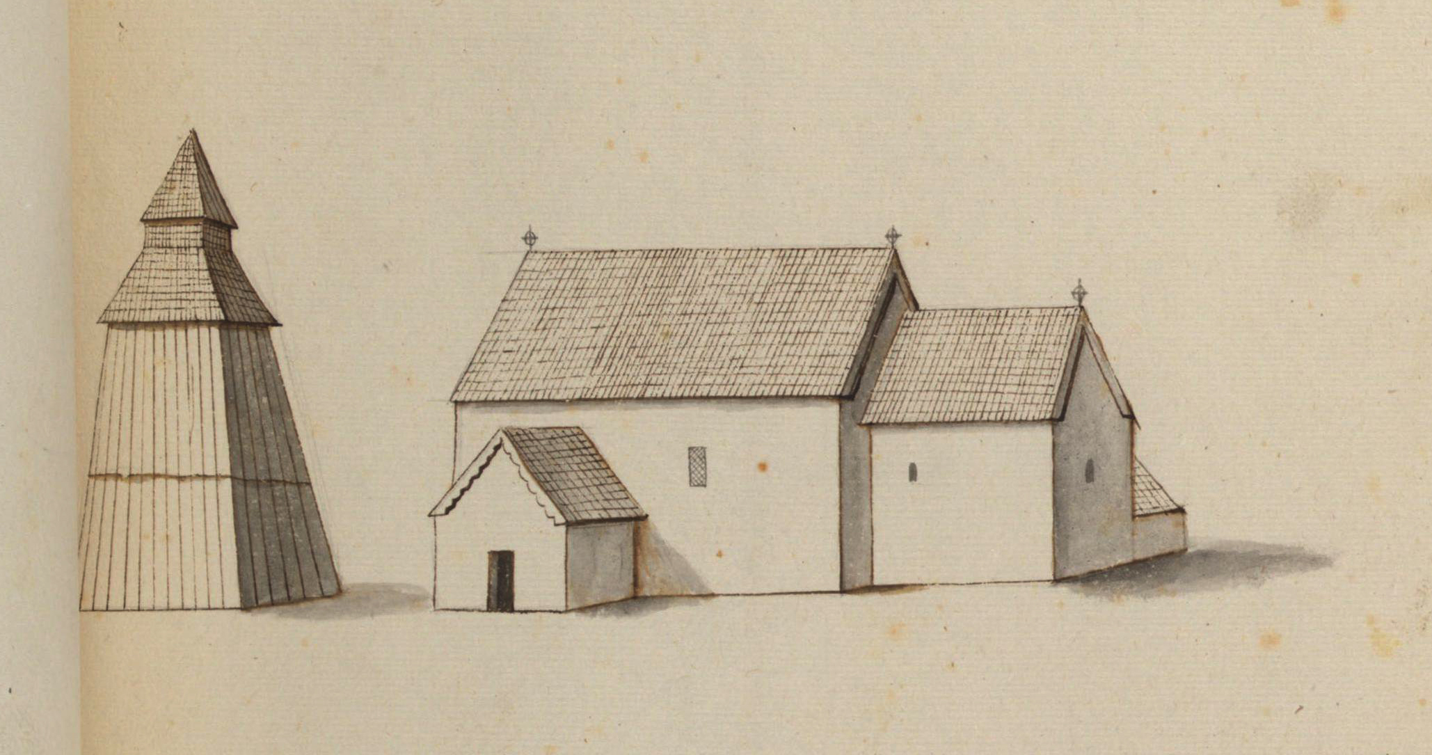 Frösve kyrka Kyrka, äldre, teckning ur Peringskiölds Monumenta, avfotograferad i färg.